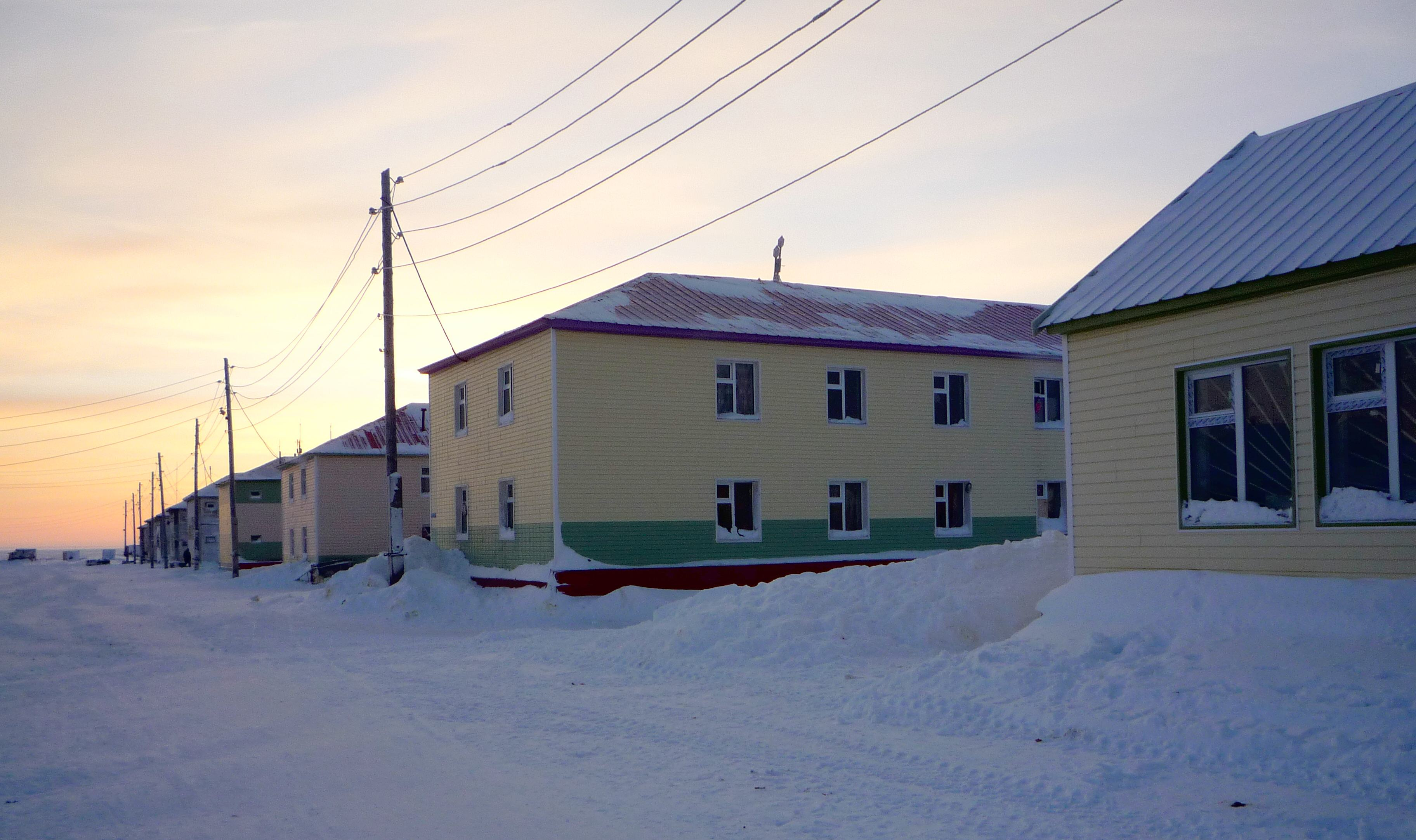 Рыткучи